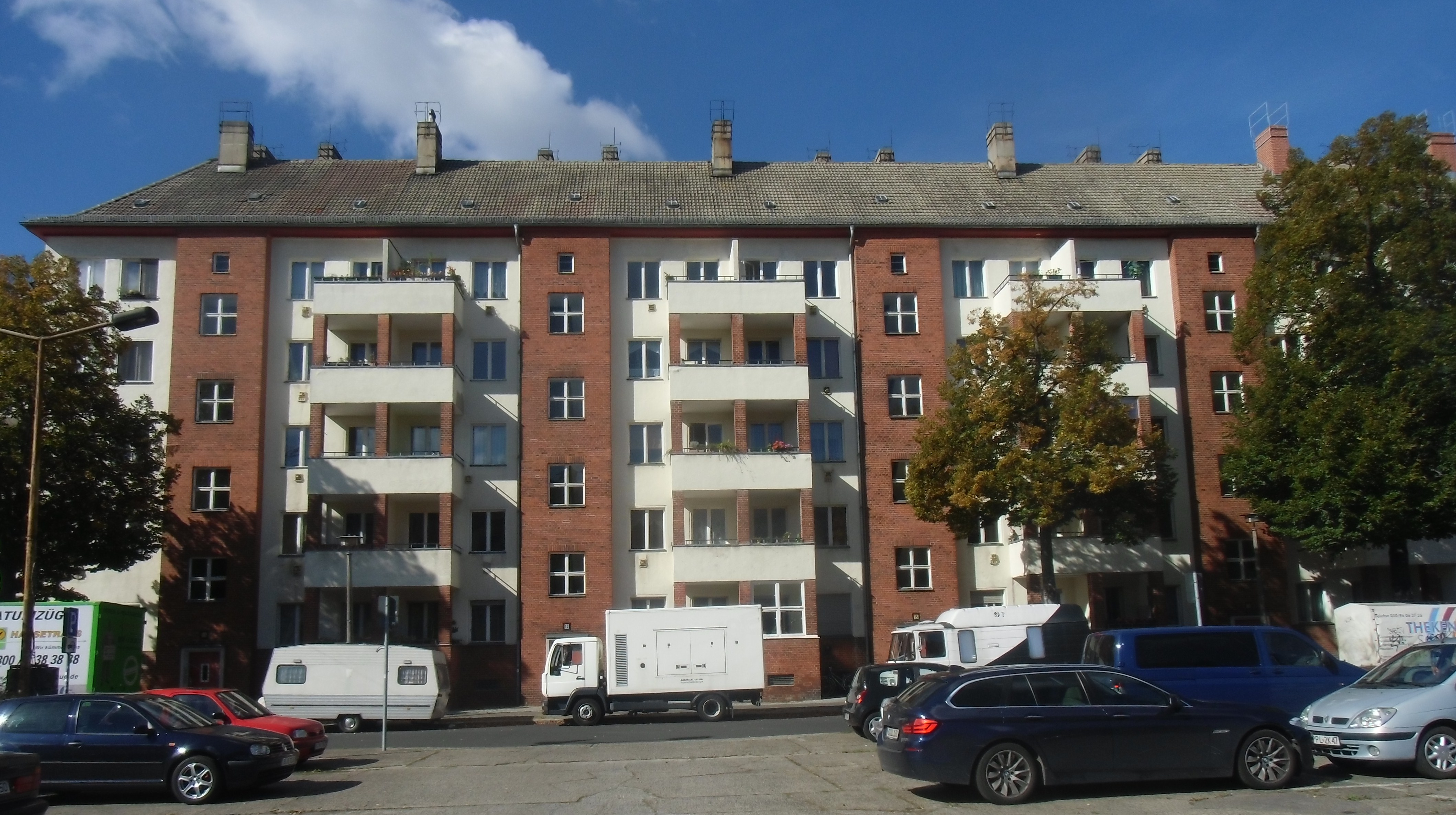 Denkmalgeschützte Wohnanlage am Pistoriusplatz Ecke Pistoriusstraße in Berlin-Weißensee, erbaut 1930-1932